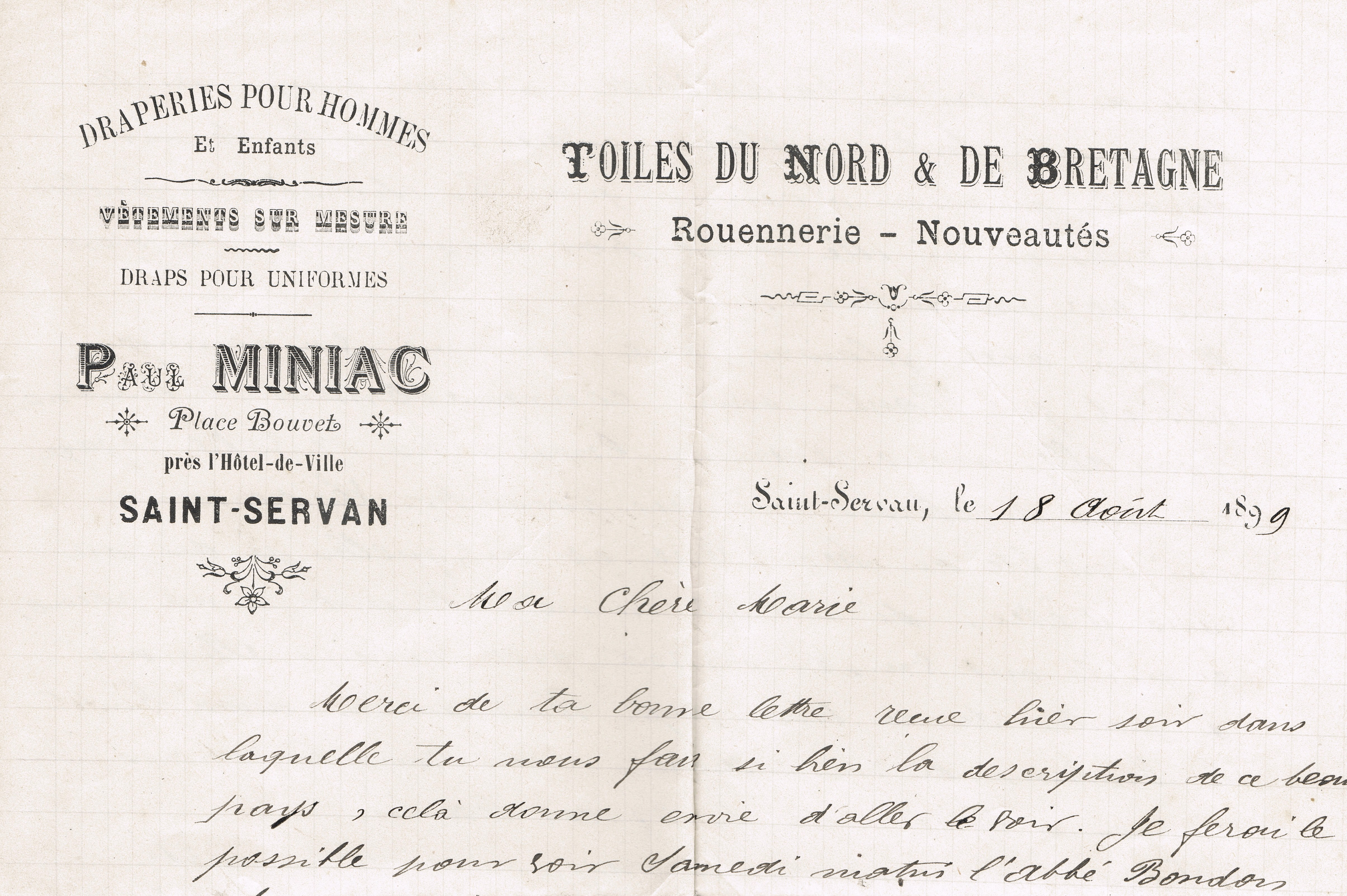 Papier à en-tête du négoce de tissu de Paul Miniac (successeur commerce Anne-Marie Duchesne, mère de l'académicien Louis Duchesne), place Bouvet à Saint-Servan-sur-Mer (Ille-et-Vilaine, aujourd'hui en Saint-Malo), lettre d'août 1899. Collections successives de la famille Miniac, Marie-Anne Miniac, Rennes, France.